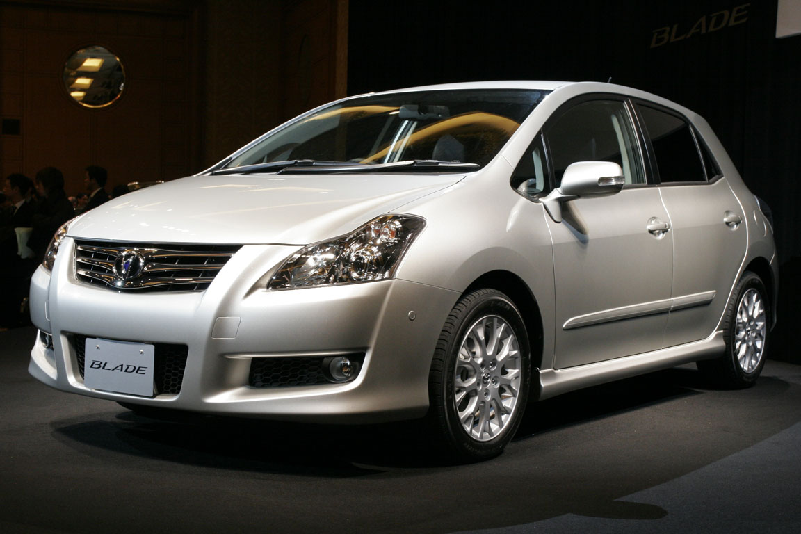 Toyota BLADE